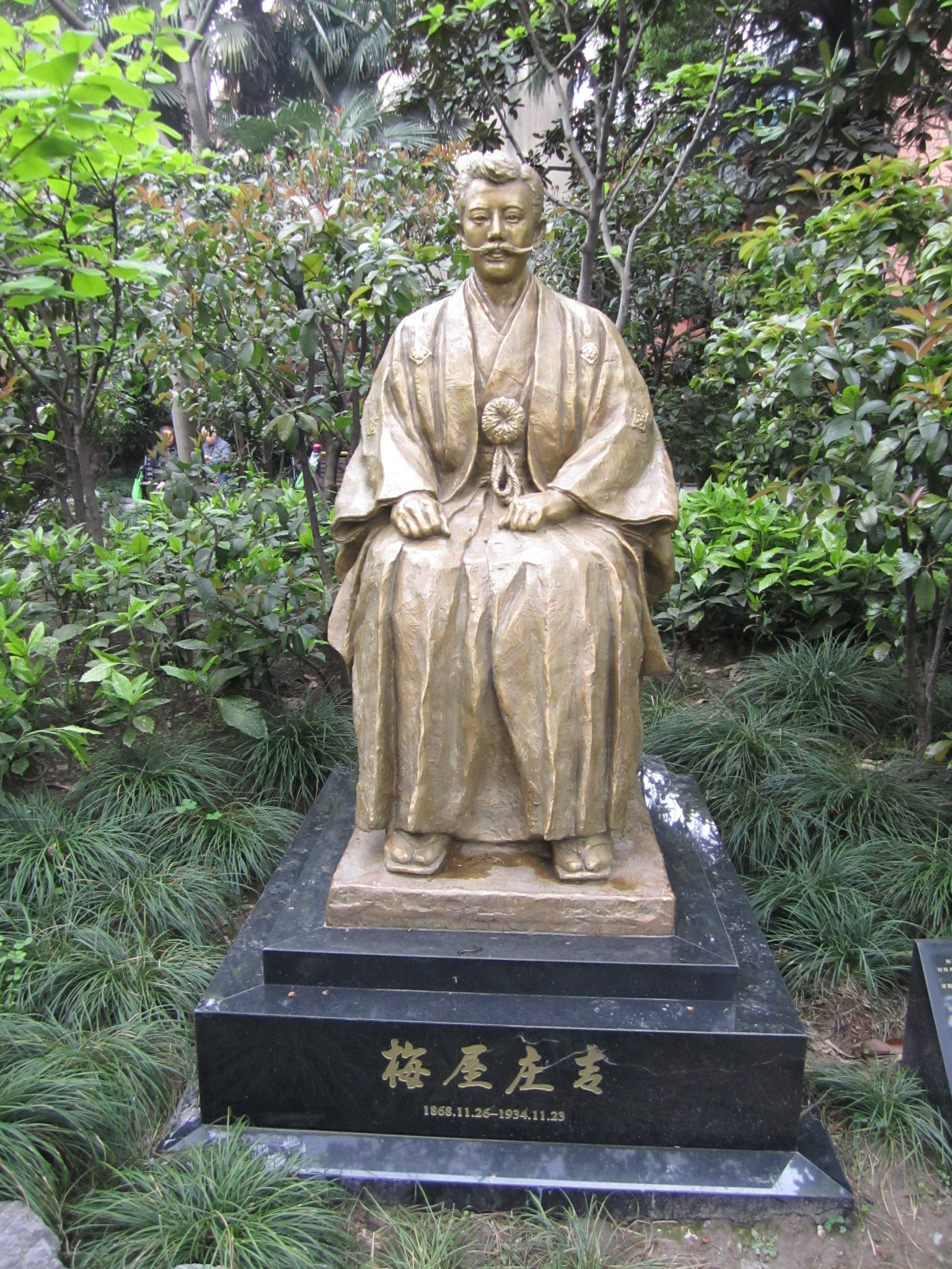 梅屋庄吉像, Shōkichi Umeya